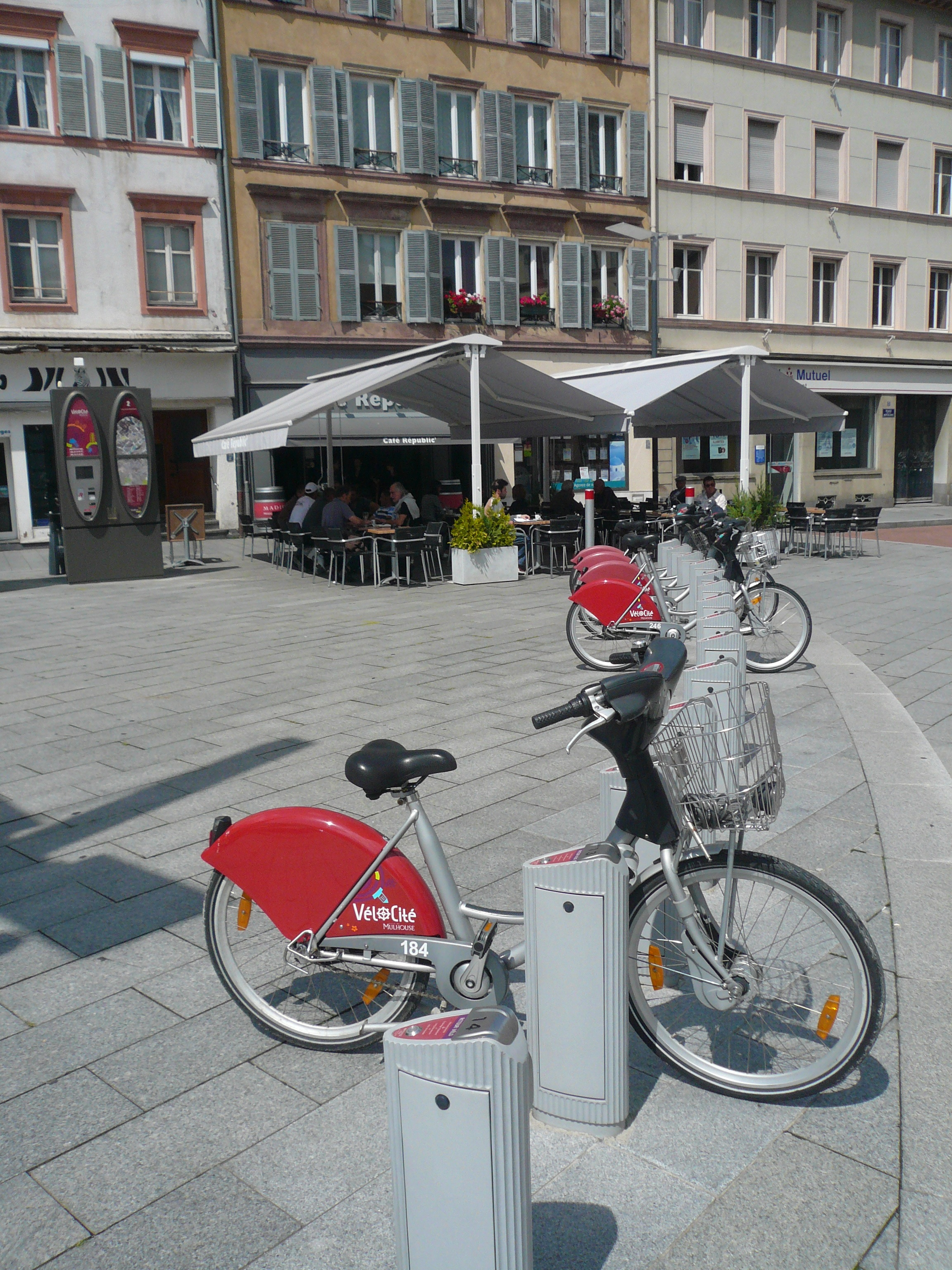 Station VéloCité à Mulhouse (Cyclocity)